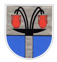 Wappen von Leiningen